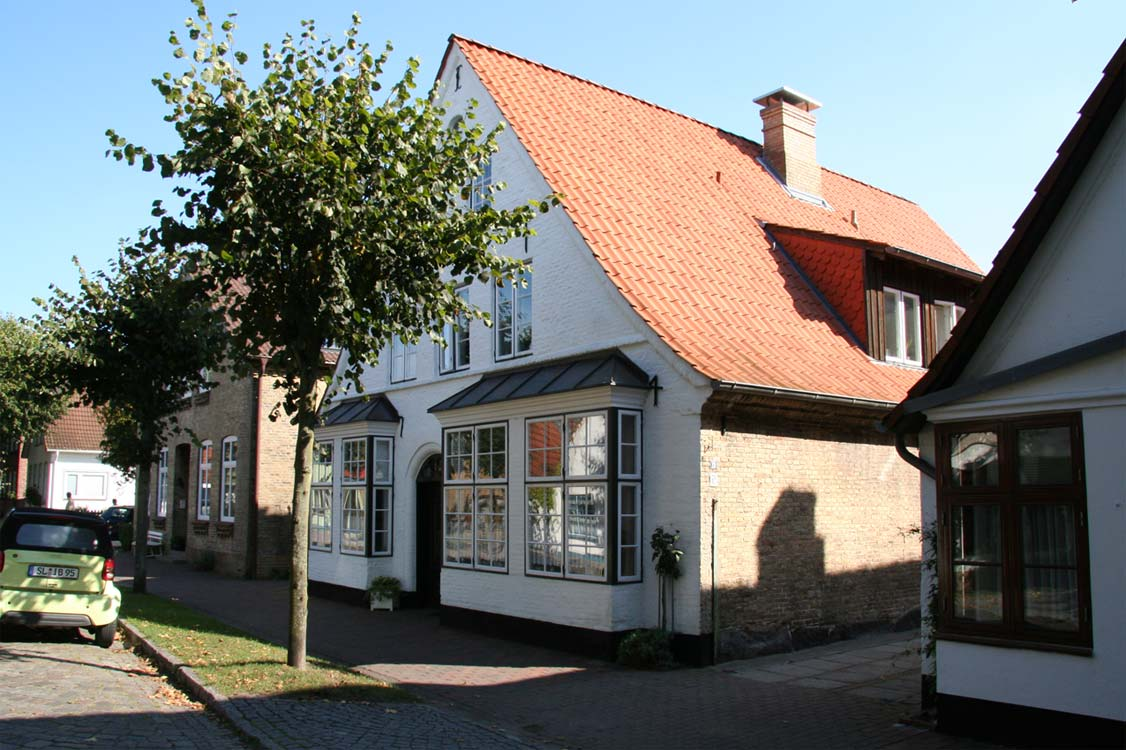 Arnis, Lange Str 19, erster Massivbau in Arnis von 1764